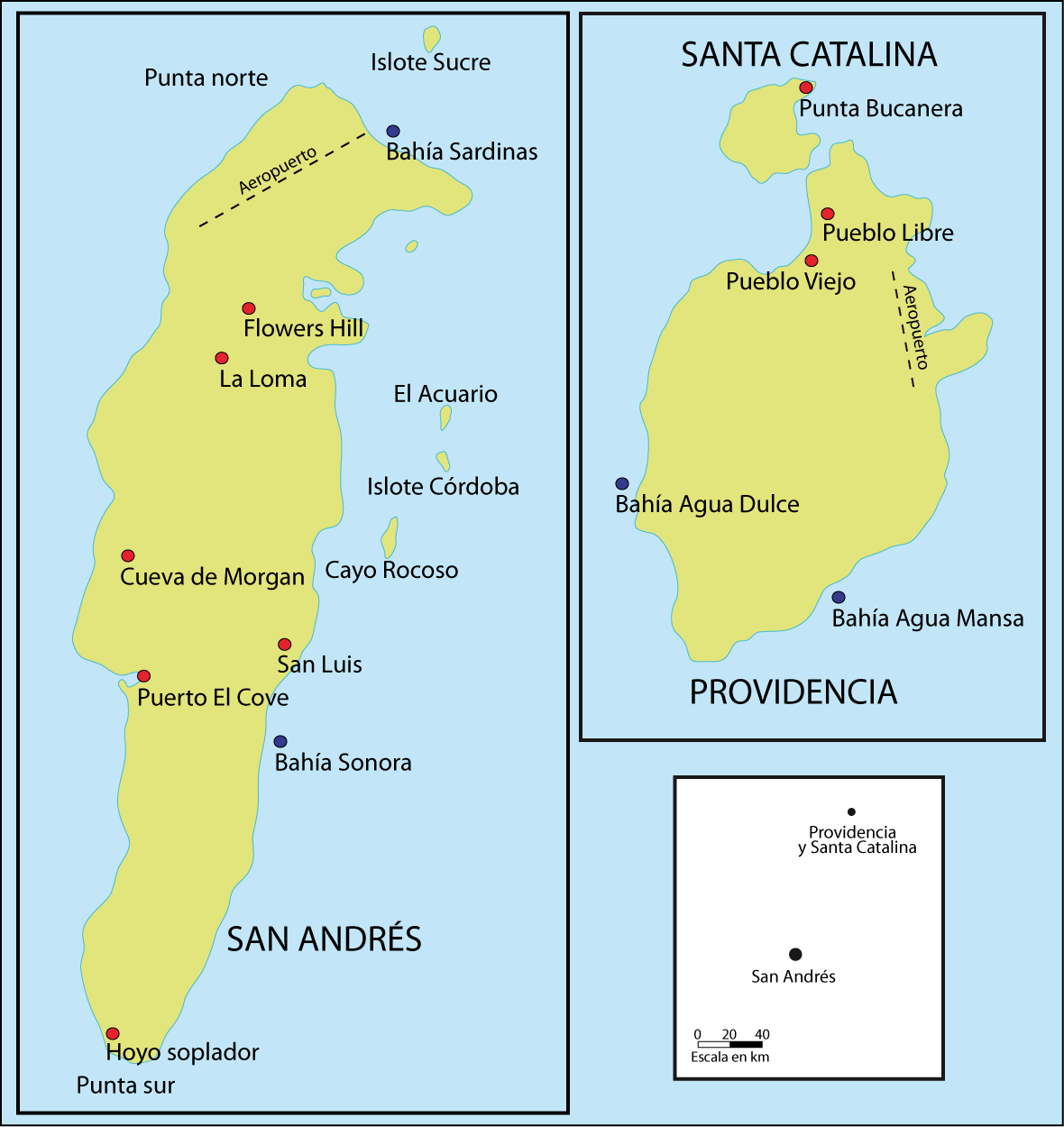 Islas de San Andrés, Providencia y Santa Catalina.